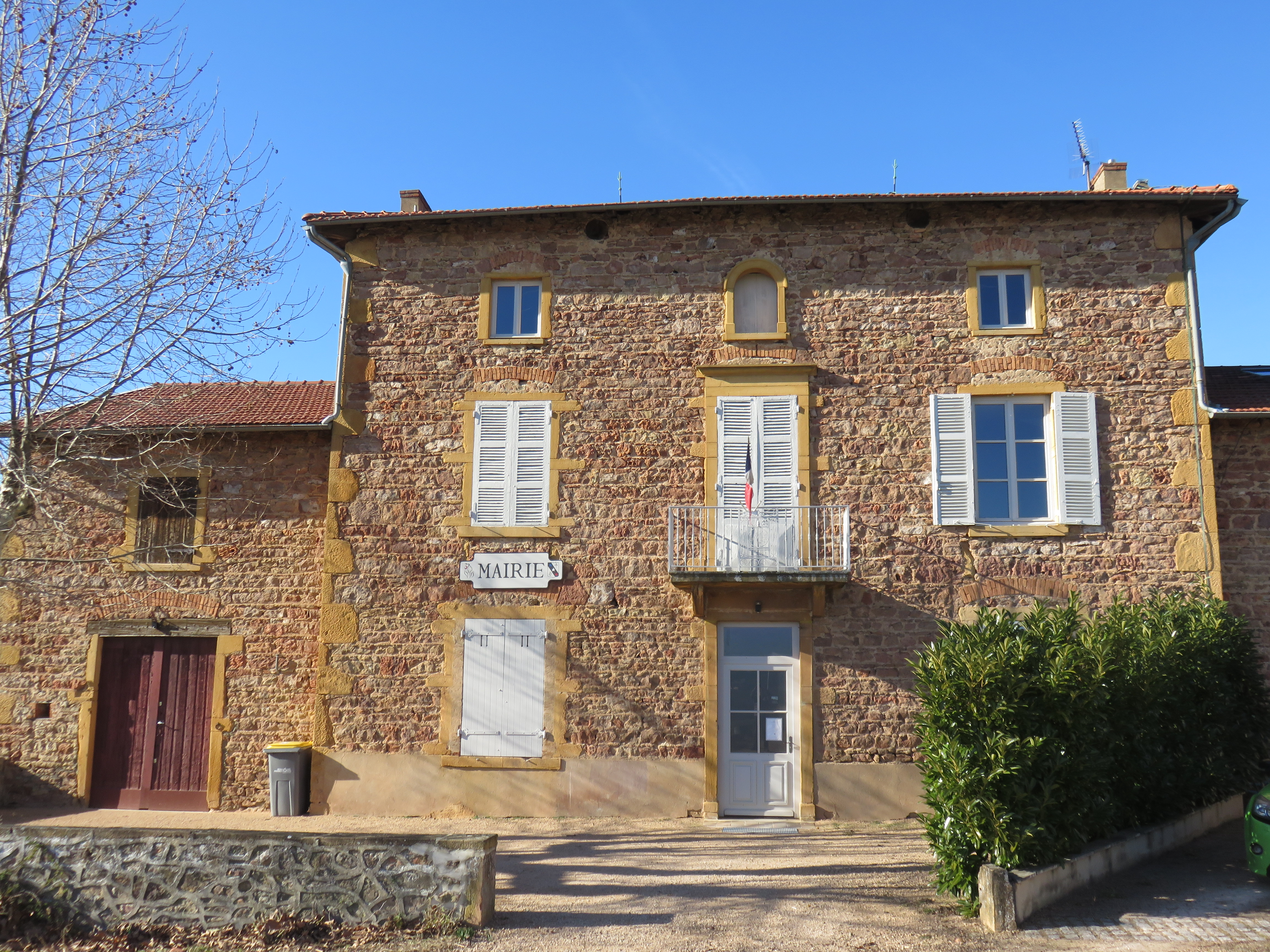 Mairie de Sainte-Paule (Rhône, France).